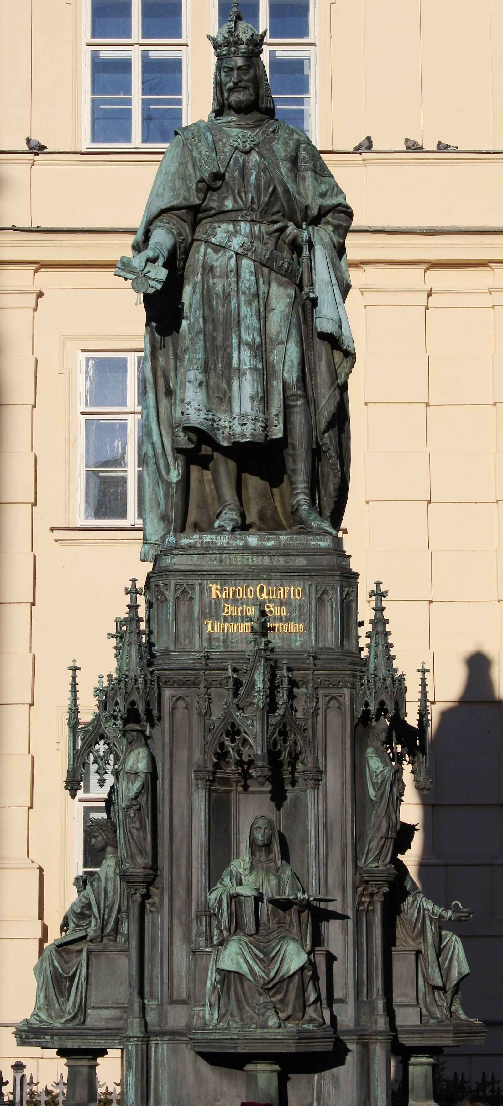 Karl IV.